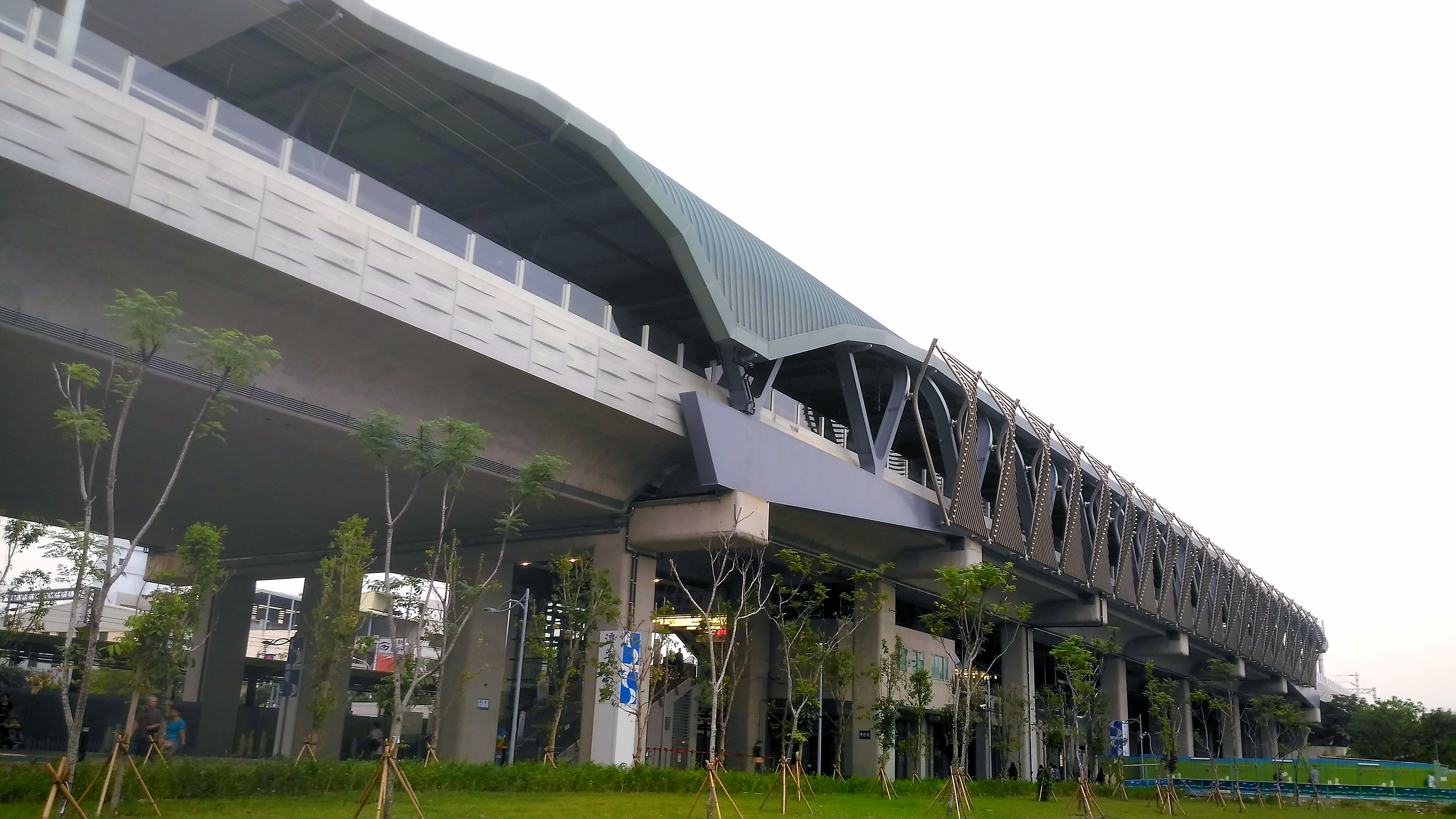 中文（台灣）: 潭子車站(新高架車站)